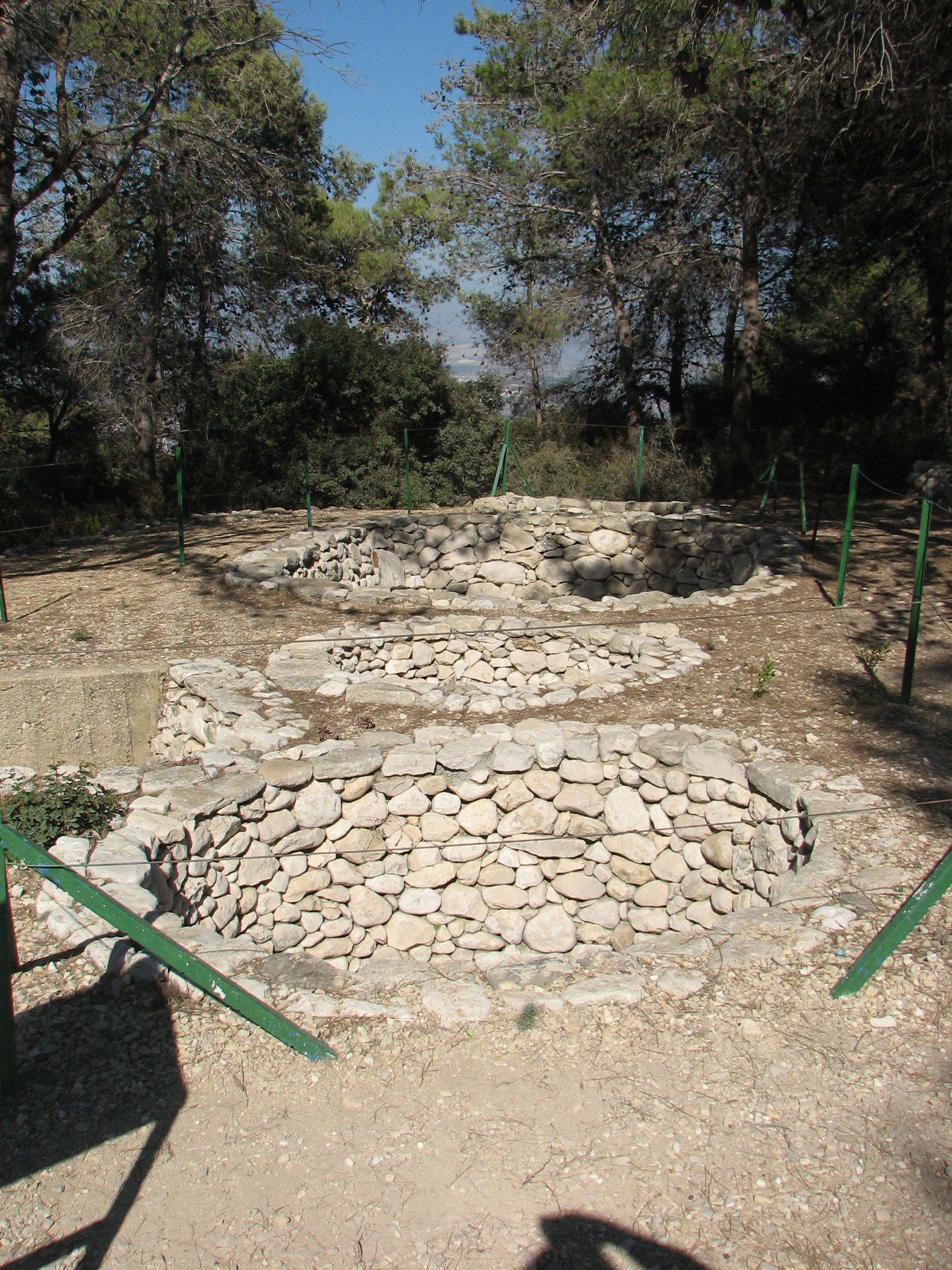 The Road of the Millennia - Archaeological Park, Hecht Museum, Haifa Israel Granaries for Storing Crops from an Israelite Fortress in the Negev. Iron Age 800-700BCE דרך הדורות הוא פארק ארכאולוגי ליד אוניברסיטת חיפה, אליו הועברו מבנים ומתקנים ארכאולוגים שמקומות שנועדו להריסה אסמים לאחסון תבואה ממצודה ישראלית בנגב תקופת הברזל 700-800 לפני הספירה האסמים נצאו מחוץ למצודה שנבנתה בימי עוזיהו ומצאו סמוך לצומת דרכים חשוב.